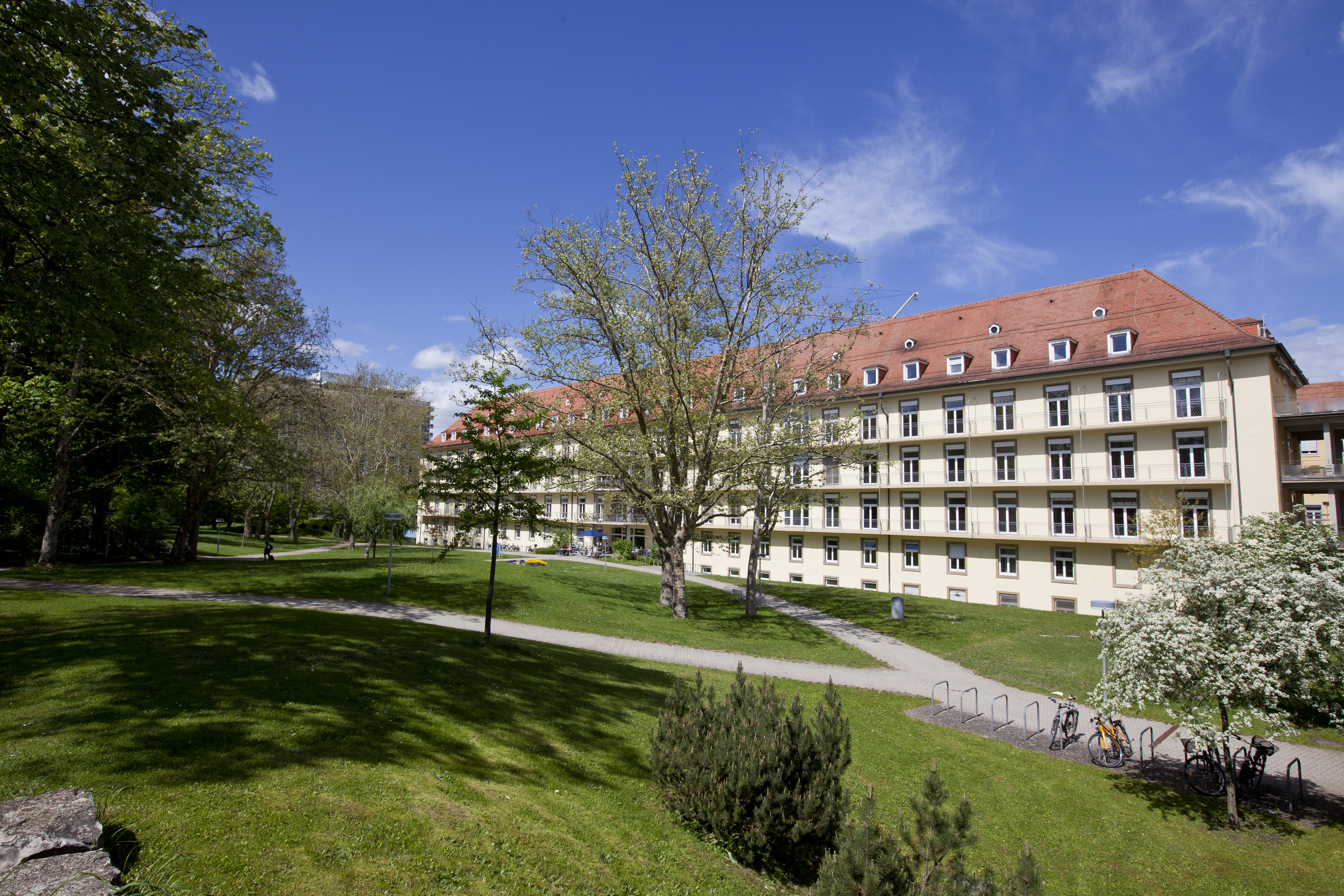 Klinik für Frauenheilkunde am Universitätsklinikum Freiburg